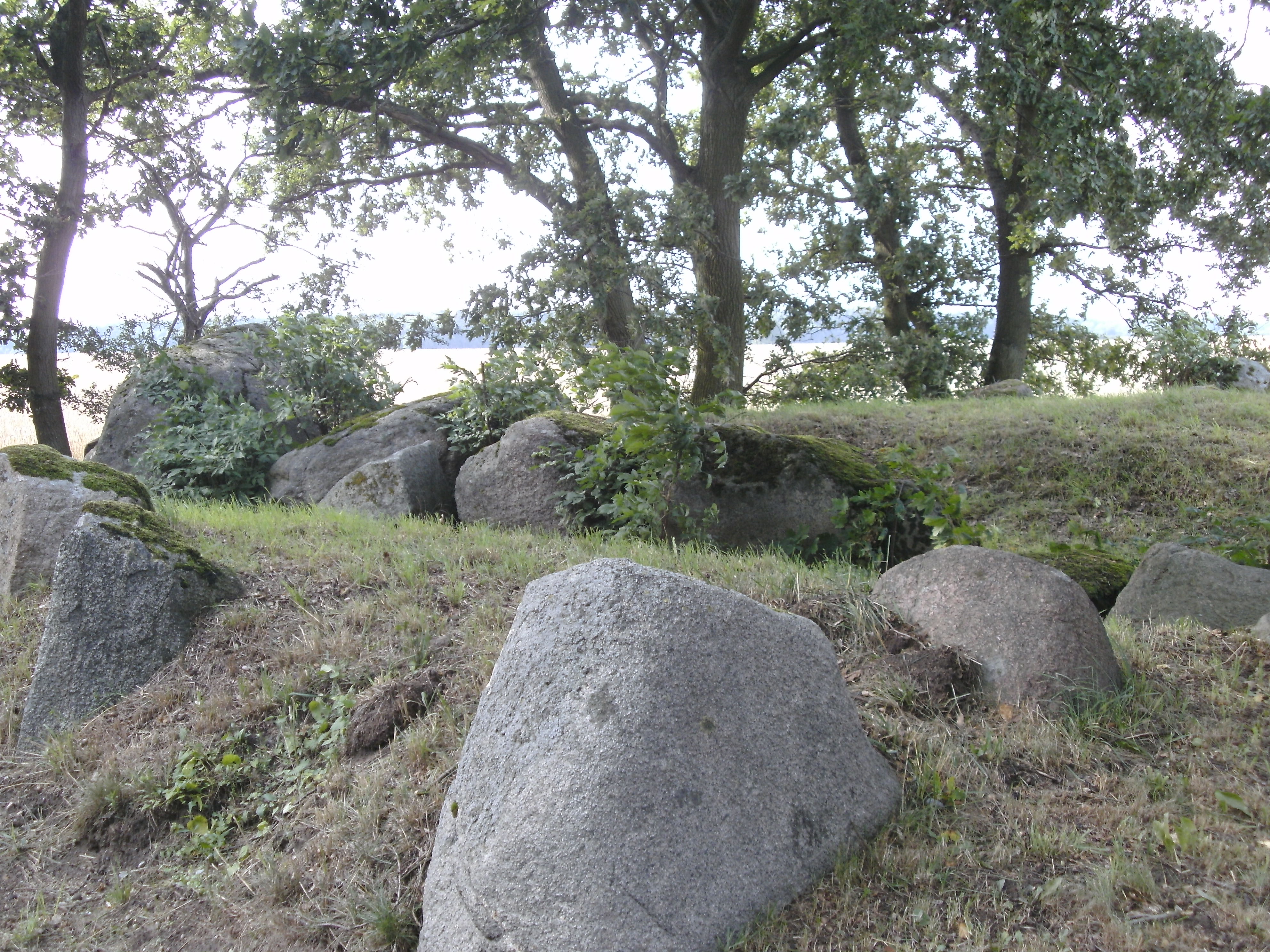 Hünengrab Kruckow Sprockhoff 562